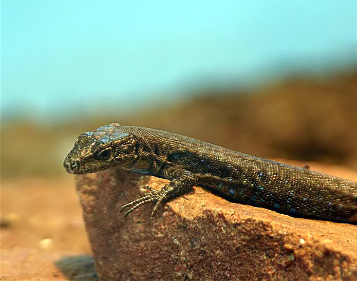 Selbst fotografiert.Aufgenommen mit einer Canon EOS 300D im Exotarium Zoo Frankfurt. Fotograf/Quelle: Petra Karstedt / Motiv: Armenische Gebirgseidechse (Darevskia armeniaca)